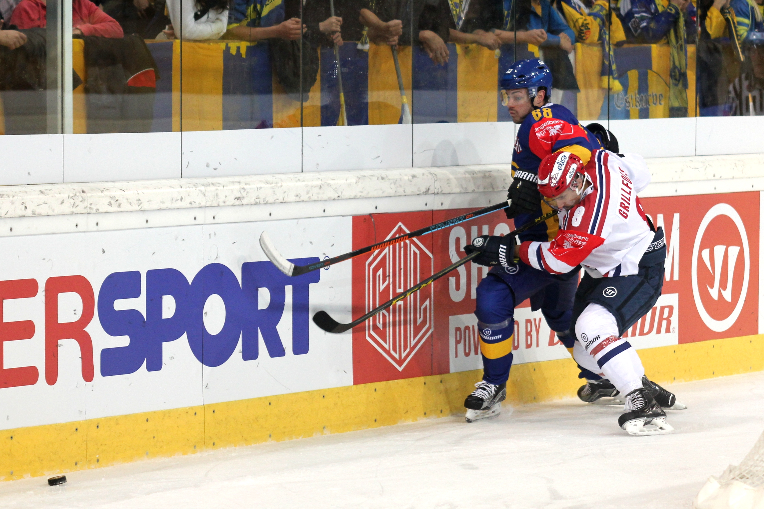 Sven Ryser (D 68), Daniel Grillfors (H 8).